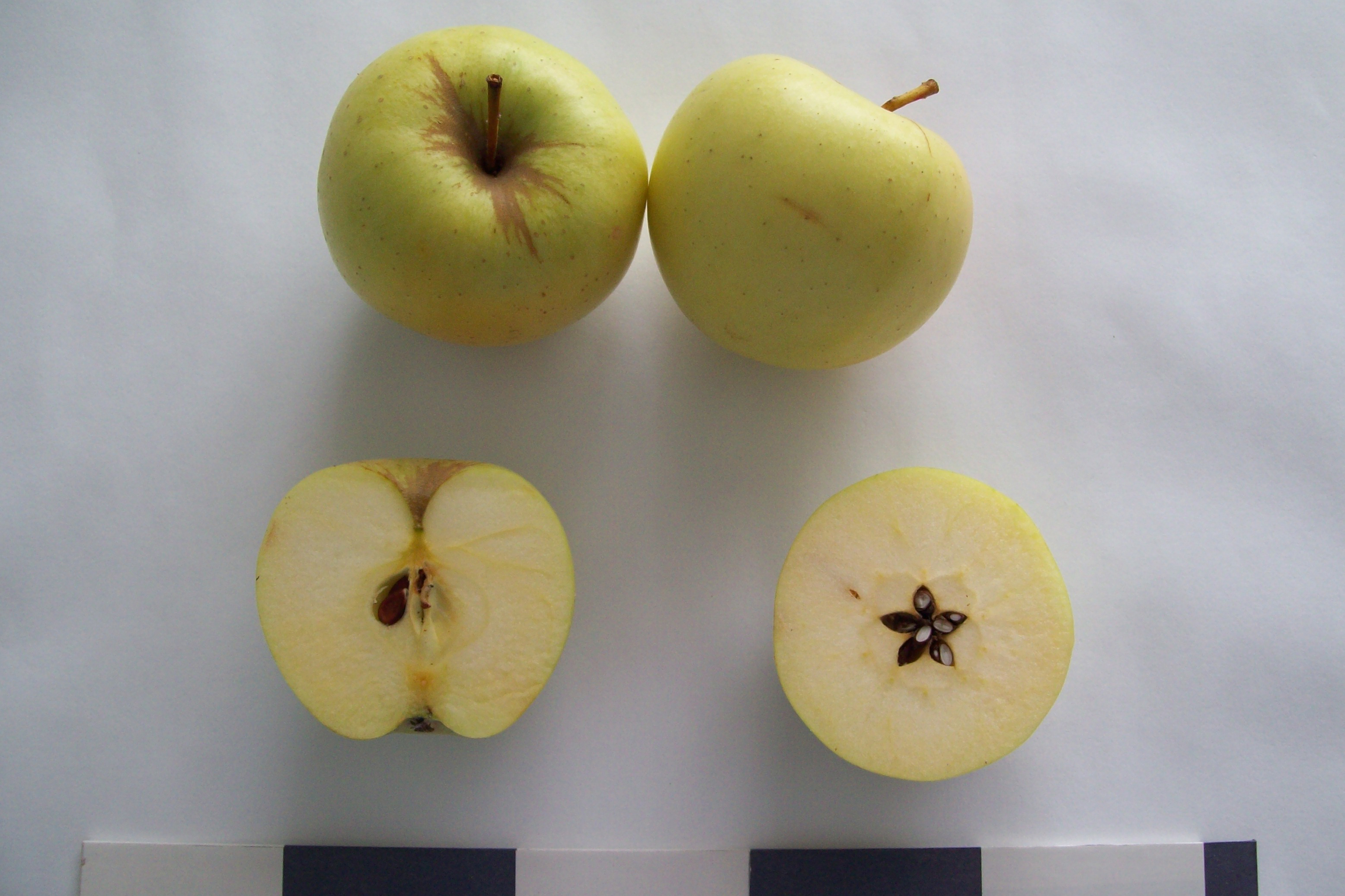 Коллекционные сорта яблони УзНИИРа.